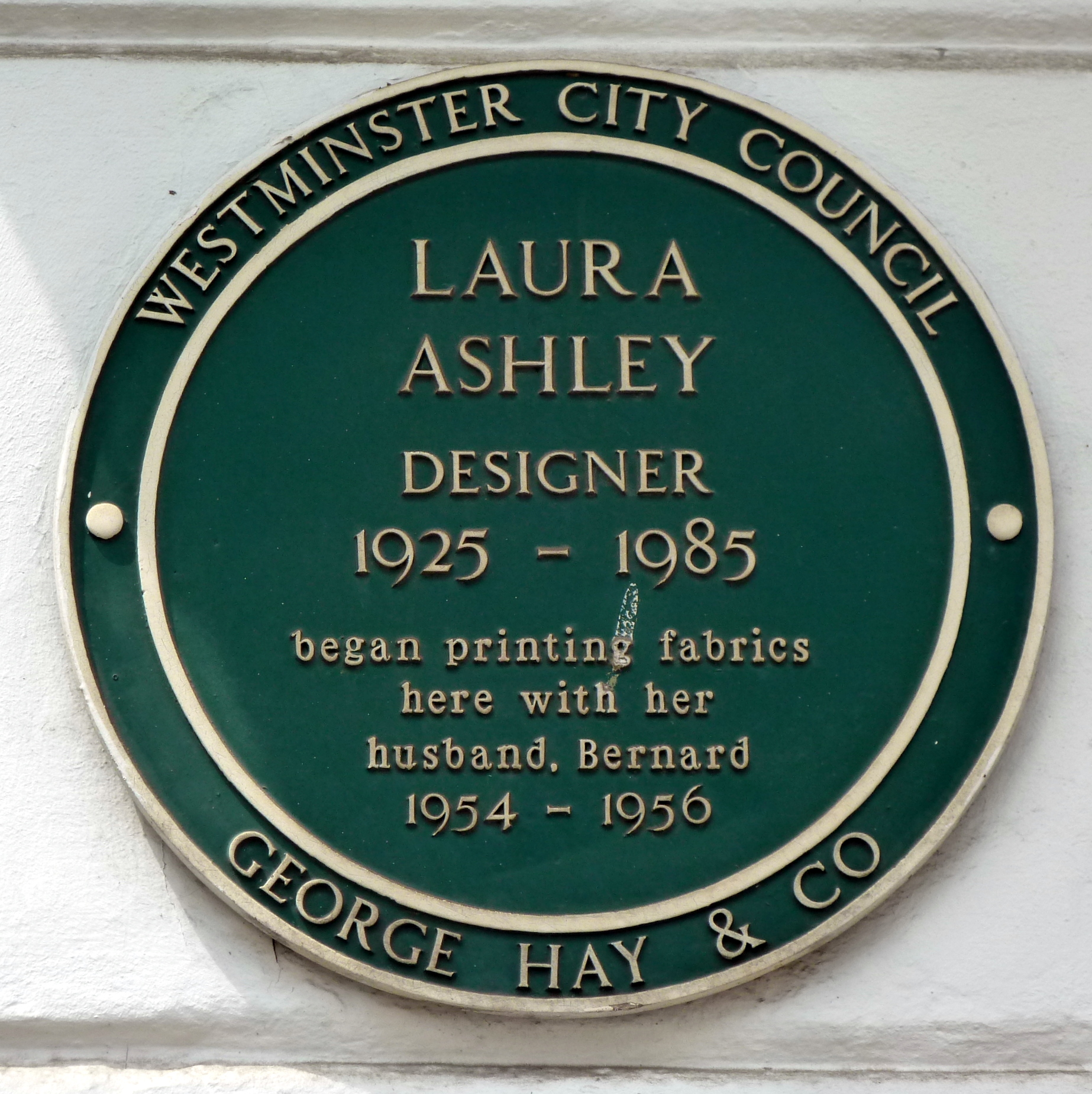 Laura Ashley